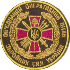 Нарукавний знак, Об'єднаний оперативний штаб Збройних сил України